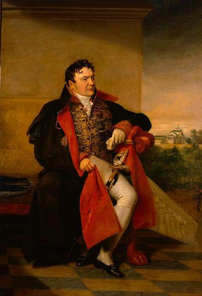 Всеволод Андреевич Всеволжский (1762-1836)